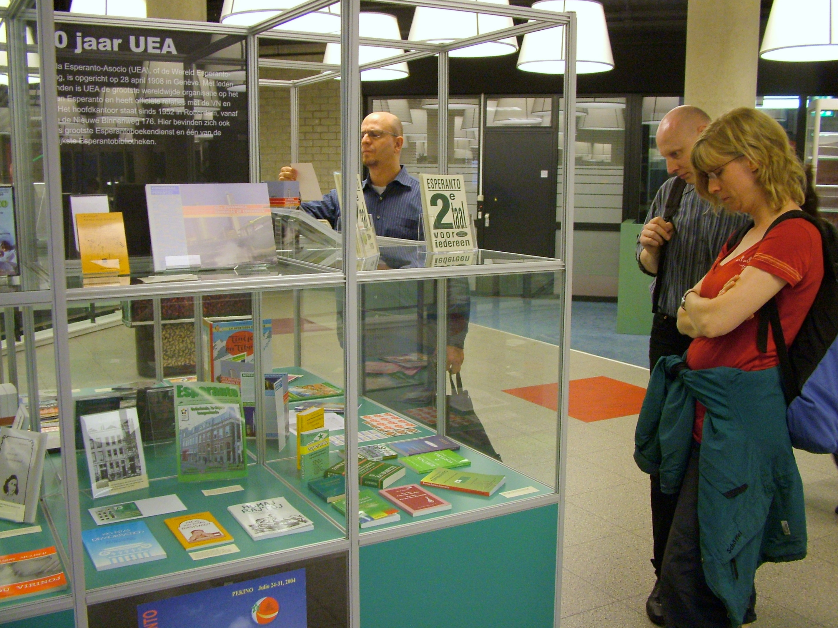 Universala Kongreso de Esperanto, Roterdamo 2008. Ekspozicio pri Esperanto kaj UEA dum la UK 2008, centra urba biblioteko de Roterdamo.